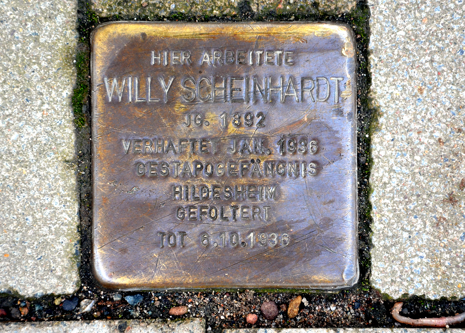 Am 3. März 2009 von dem Künstler Gunter Demnig im Beisein des späteren Oberbürgermeisters Stefan Schostok vor dem ehemaligen Gebäude des Fabrikarbeiterverbandes verlegter Stolperstein für den von den Nationalsozialisten ermordeten Gewerkschafter und Sozialdemokraten Willy Scheinhardt (1892-1936), der mit seiner Familie in dem Haus An der Börse 3 (ehemals Rathenaustraße) Ecke Sophienstraße in Hannover gewohnt und gearbeitet hatte ...